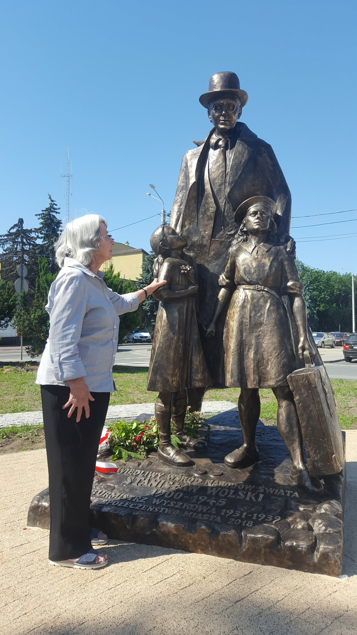 הפסל לזכרו של סטניסלב וולסקי, יחד עם שתי הילדות שהציל, רחל(מימין) וברוניה (משמאל), שמצולמת גם ליד הפסל, למחרת הסרת הלוט, 4 יוני 2018. הפסל - פרופסור שצ'סלב דז'וויגאז (Czesław Dźwigaj)